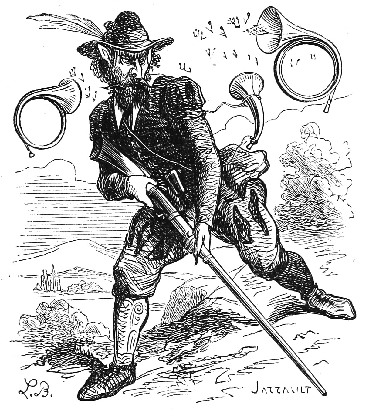 Barbatos. Illustration du Dictionnaire infernal de Jacques Auguste Simon Collin de Plancy par Louis Le Breton, 6eme édition, 1863.